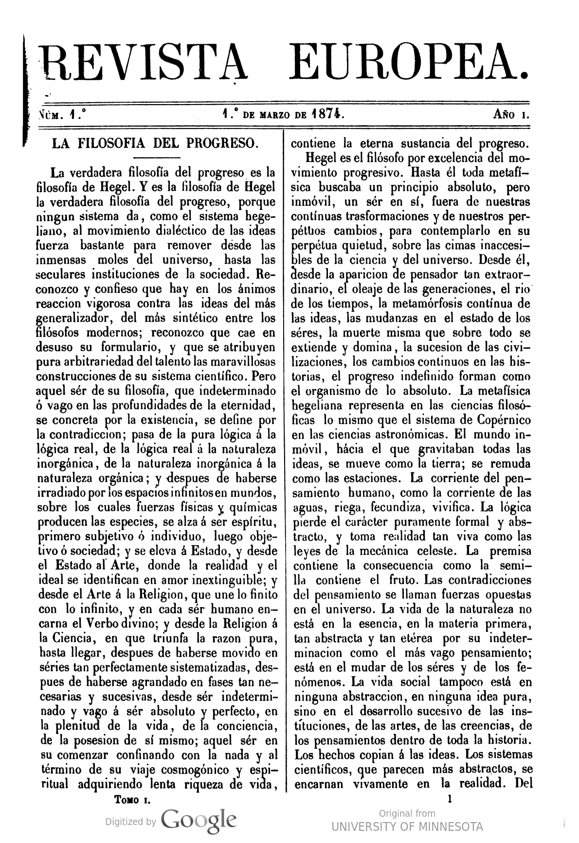 Primera página de Revista Europea nº 1, 1 de marzo de 1874.